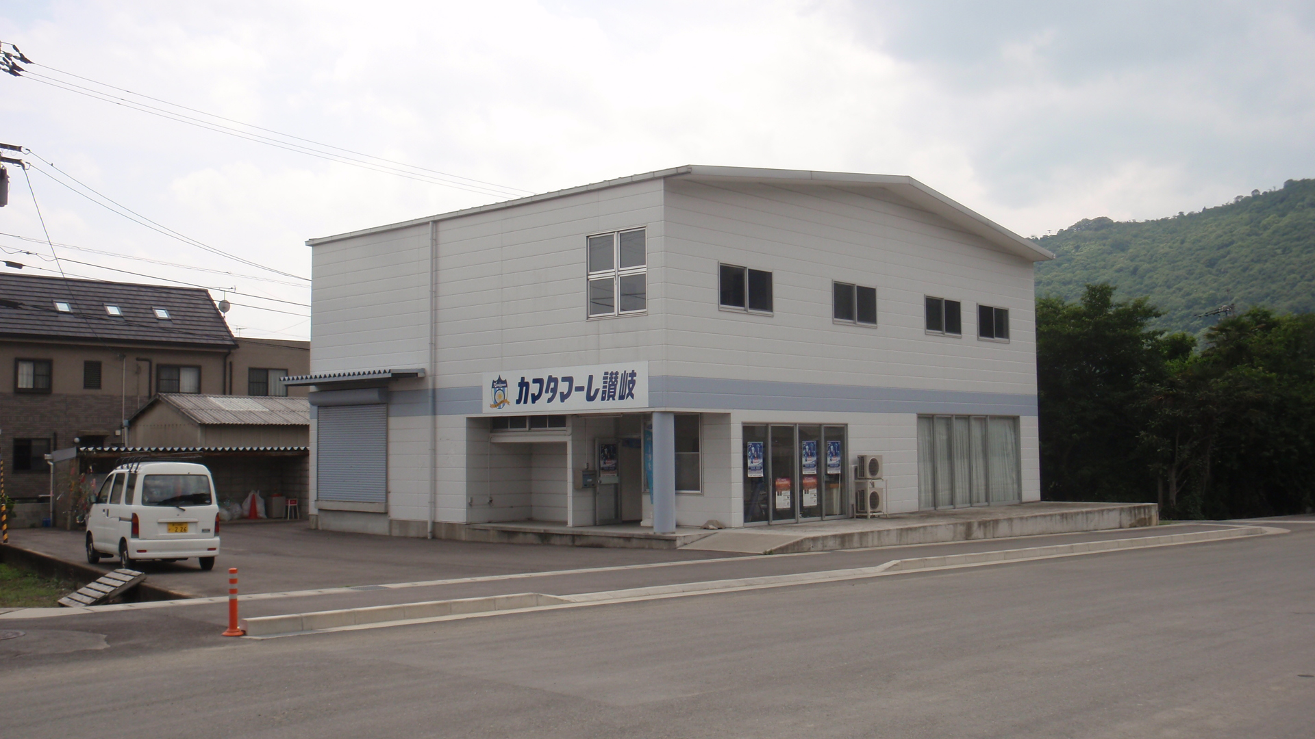 香川県高松市にあるカマタマーレ讃岐本社。